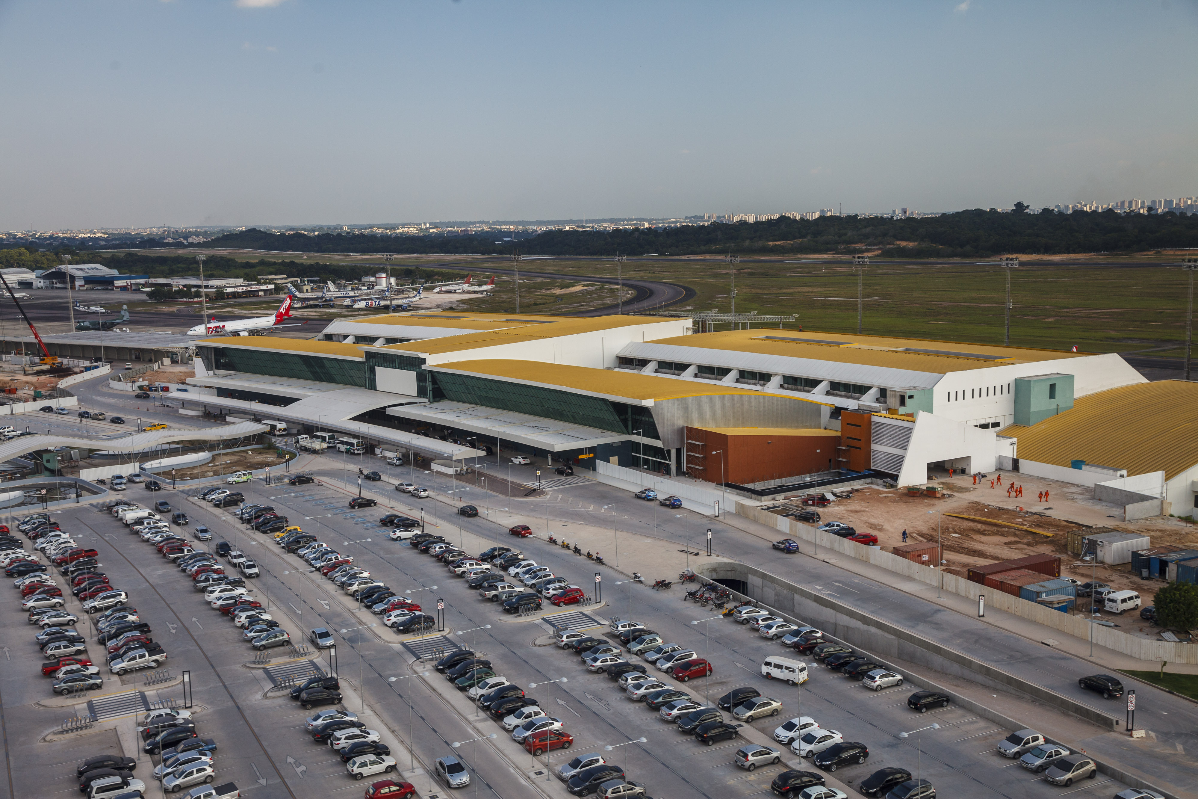 Aeroporto Internacional de Manaus, no Estado do Amazonas, Brasil.